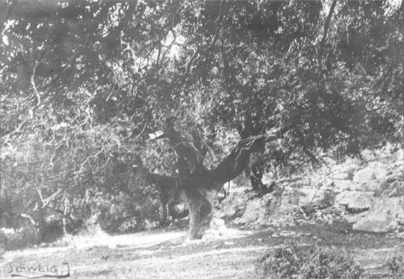 " עצי הארבעים " - מקום קדוש לערבים בחיפה